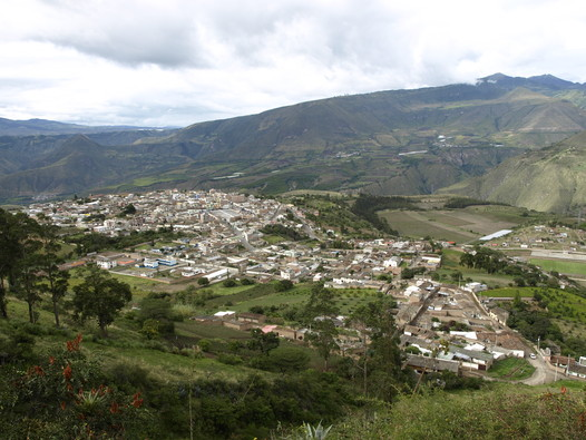 Pimampiro tierra del sol